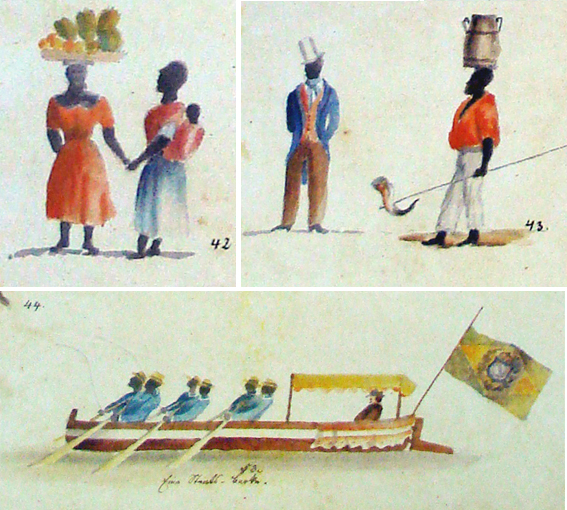 detalhes de aquarela de Herrmann Wendroth: negros da Província de São Pedro, 1852.